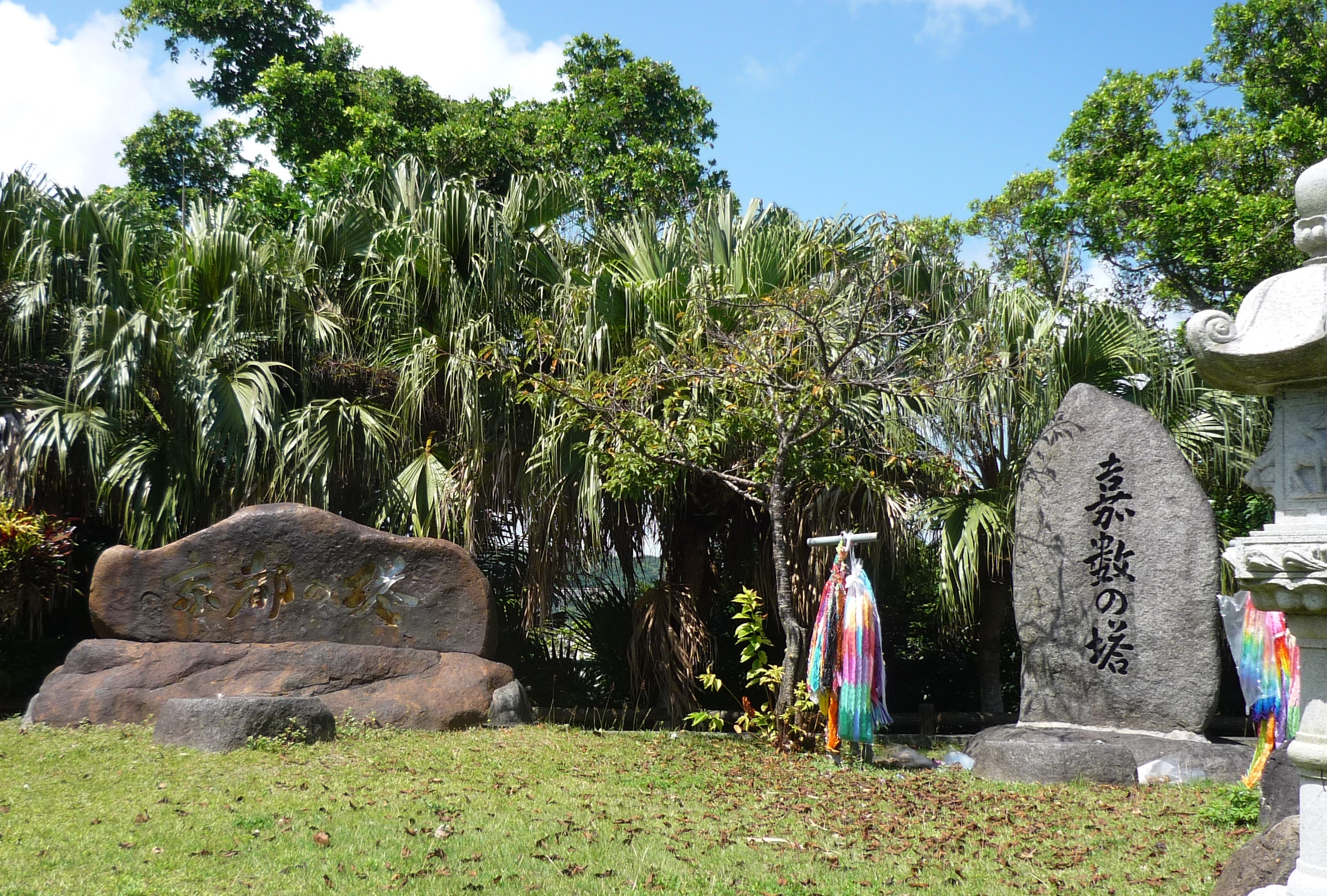 嘉数高台公園の京都の塔と嘉数の塔